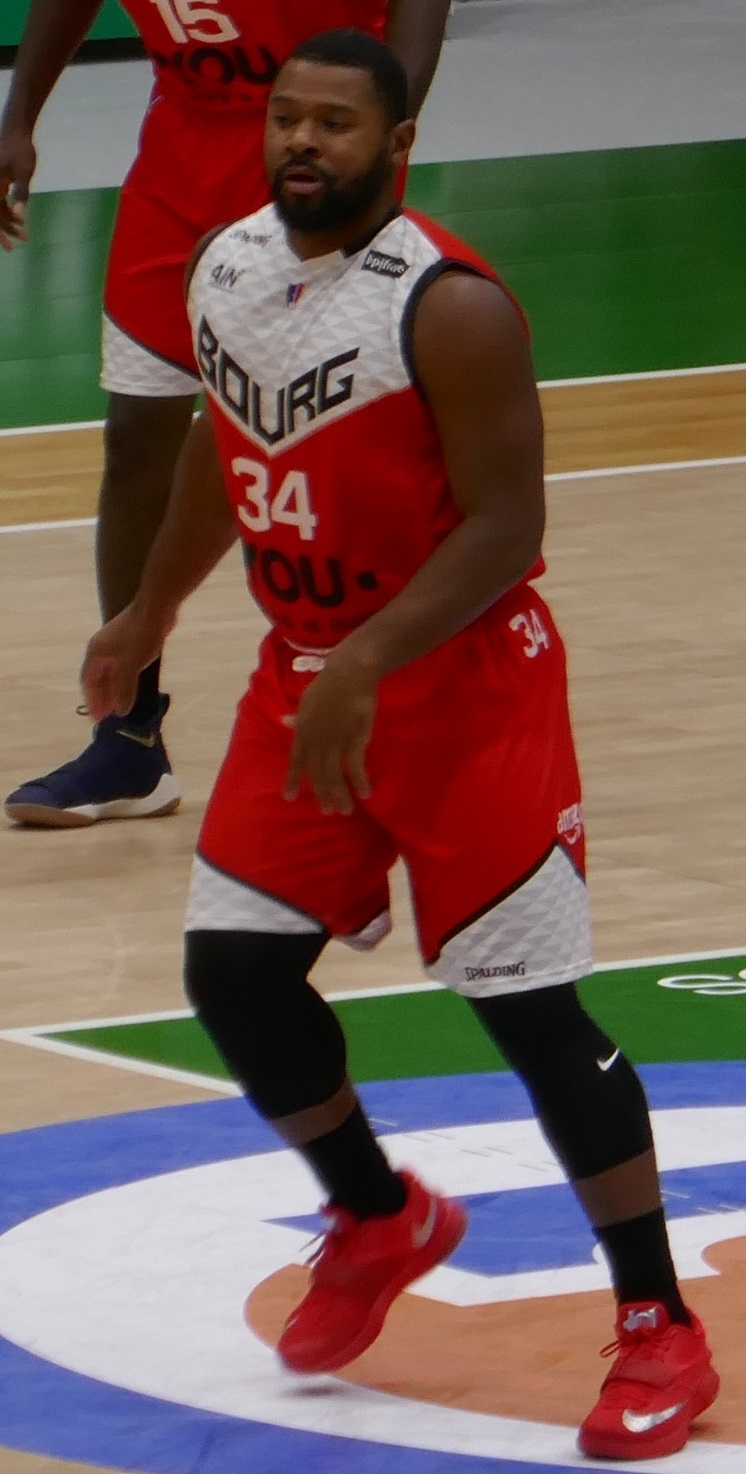 Lance Jeter en 2017 avec JL Bourg